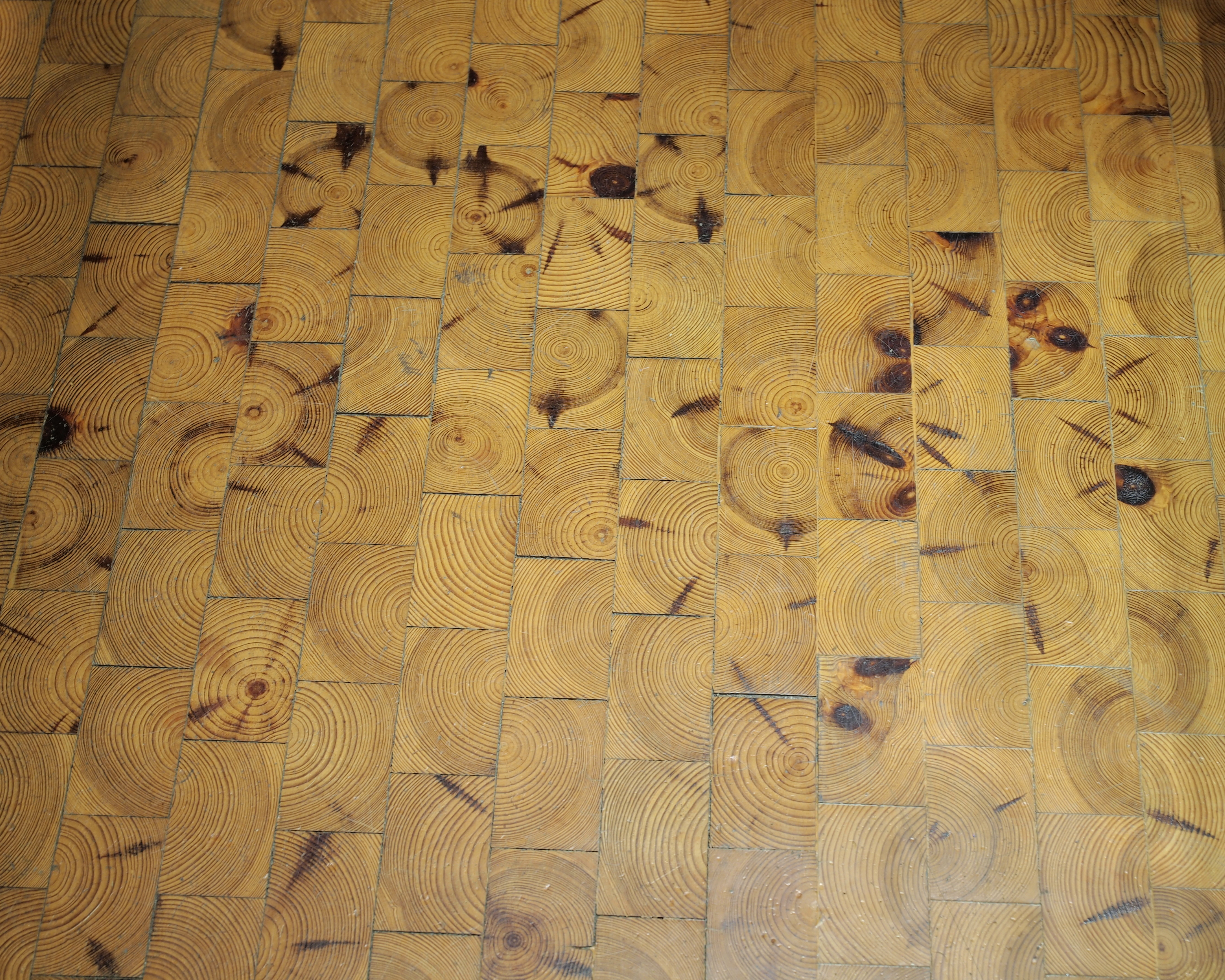 DASA - Hirnholzparkett in einigen Ausstellungsräumen